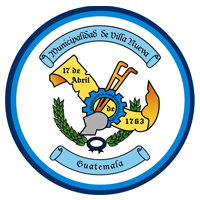 Escudo del Municipio de Villa Nueva